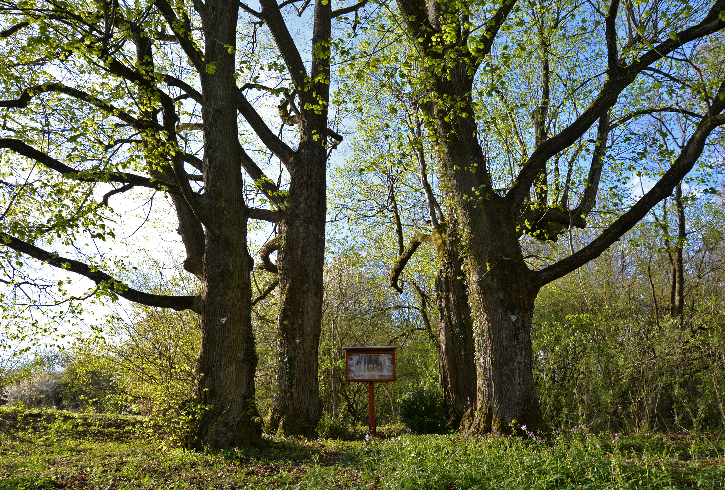 In der Gemeinde Simmelsdorf stehen unterhalb der Bühler Kirche diese vier Linden mit einem Bildnis des Abendmahls.